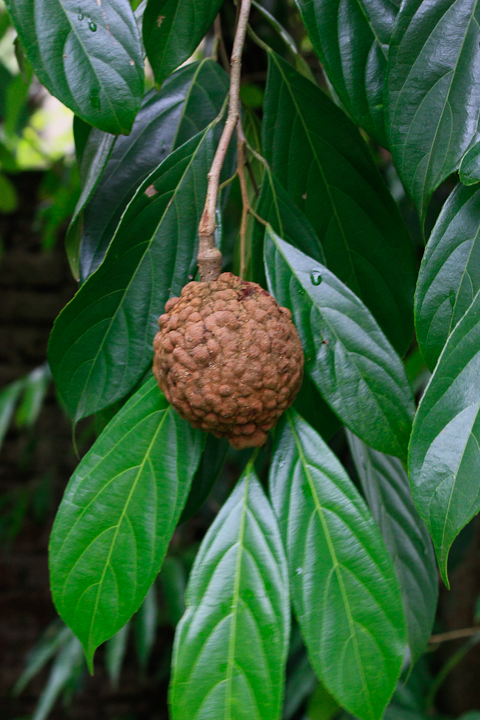 മരോട്ടി കായ